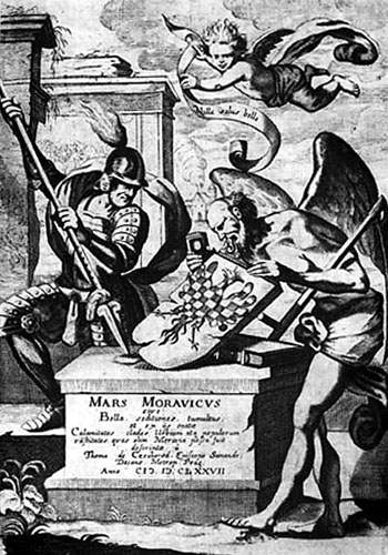 Titulní list knihy Mars Moravicus Tomáše Pešiny z Čechorodu